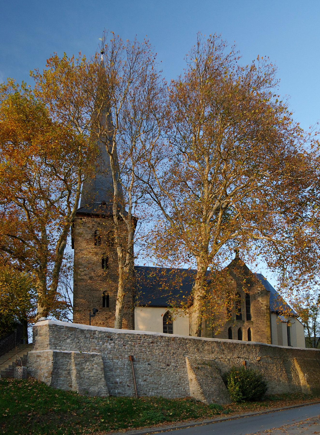 Evangelische Kirche in Fröndenberg-Dellwig Nordrhein-Westfalen, Deutschland.